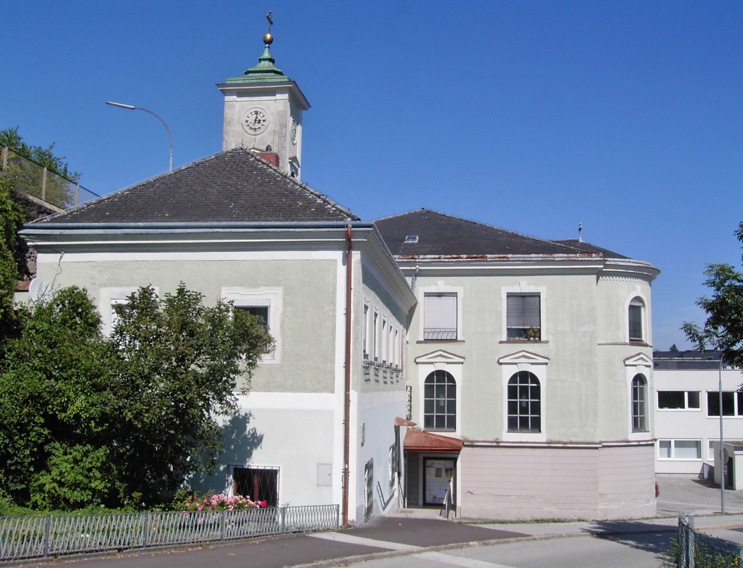 Steyr Annaberg 6, Pfarrerstöckl samt Anna-Kapelle, Fassadenansicht Annaberg